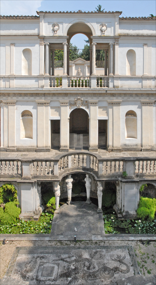 La loggia et le nymphée de la villa Giulia La Villa Giulia a été édifiée dès 1551 à la demande du Pape Jules III (1550-1555) qui a fait appel à trois architectes éminents : Vasari, Vignole et Ammannati. La villa est dotée d'une première cour intérieure avec un portique en hémicycle dont la voute est décorée à fresque. Les peintures murales imitent une tonnelle garnie de sarments de vigne, de rosiers et de jasmin. En 1552, Bartolomeo Ammannati a réalisé un deuxième espace doté d'une loggia avec un escalier en fer à cheval, d'un nymphée avec rocailles, fausses grottes et cariatides, le tout décoré de sculptures romaines. Les deux allégories fluviales représentent l'Arno et le Tibre. Au 20ème siècle pour développer le musée national étrusque, créé initialement en 1889, deux ailes ont été ajoutées à la villa. Le temple étrusque d'Alatri a été reconstitué dans le jardin de droite. Les photographies n'étant pas permises à l'intérieur du musée (on ne comprend pas pourquoi car il n'y a aucun problème de droit d'auteur et de risque de dégradations), on se contentera d'images du jardin et du bâti. Panoramique vertical